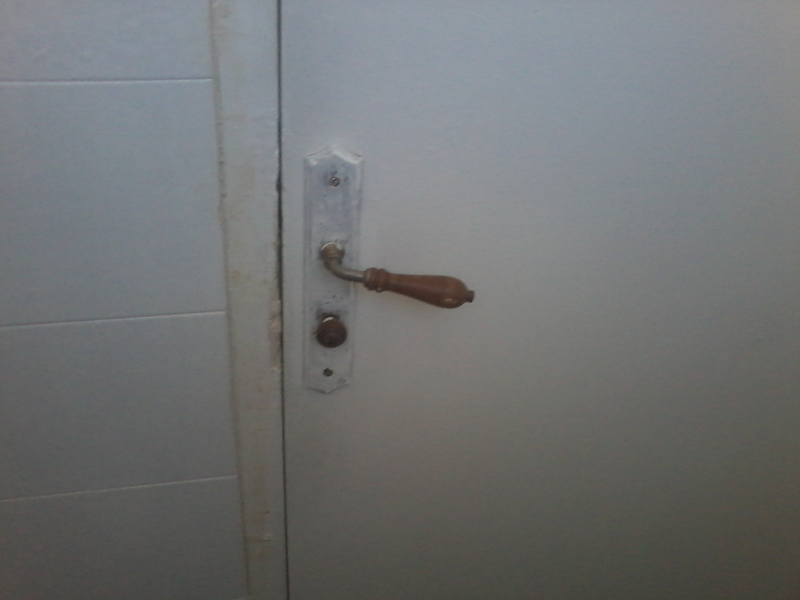 Gros plan sur une poignée et un verrou en bois, porte blanche intérieure, mur blanc intérieur